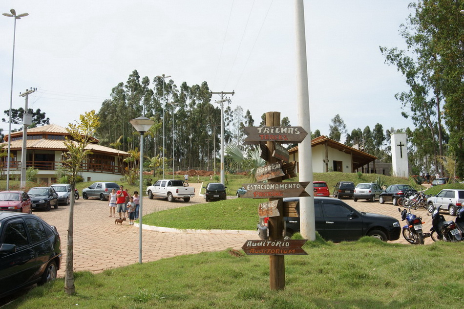 Imagem do município de Itapeva, estado de São Paulo, Brasil.